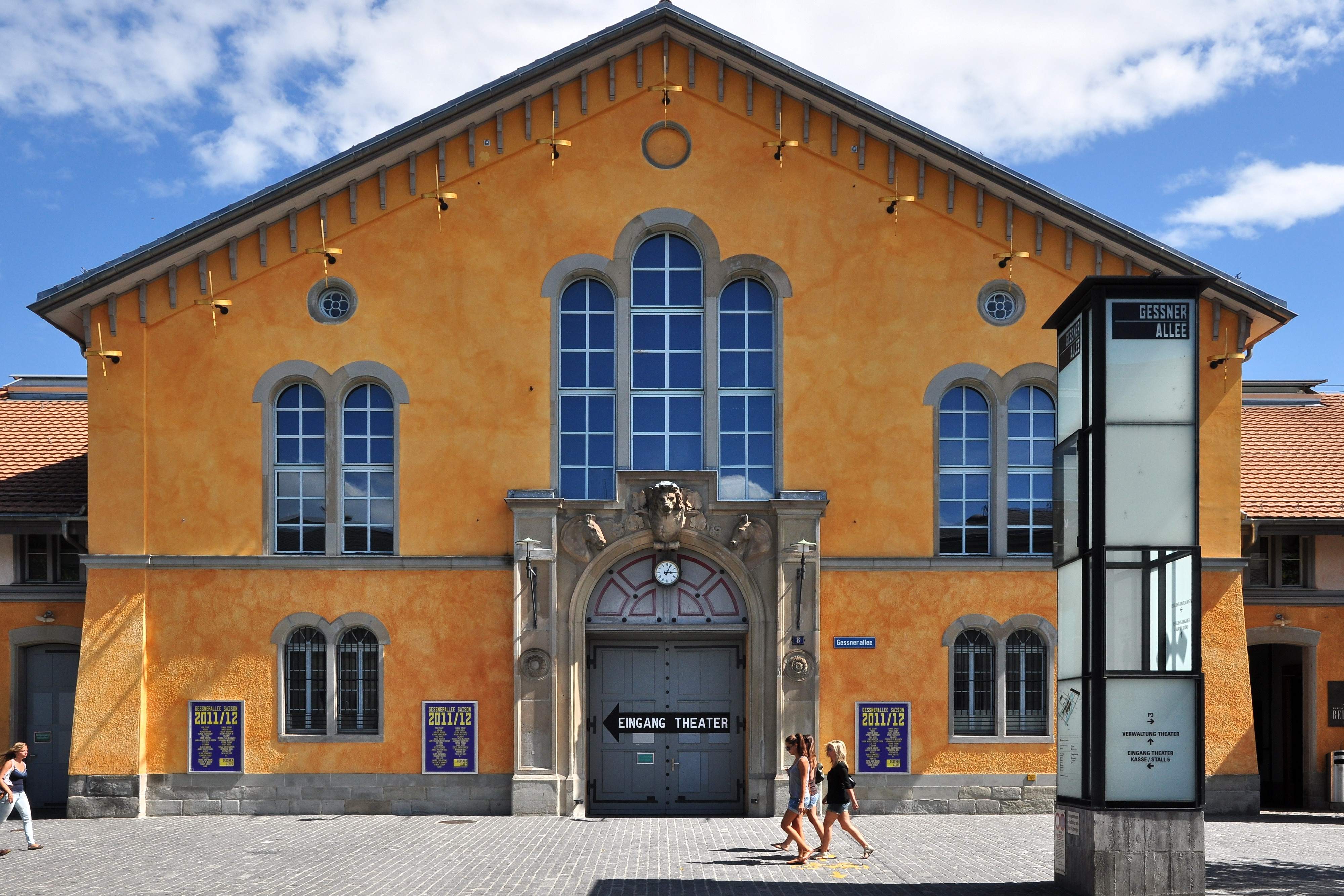 Theaterhaus Gessnerallee in Zürich (Switzerland)